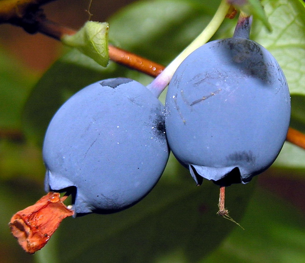 Vaivoras (Vaccinium uliginosum) vaisiai - uogos Šeima. Erikiniai (Ericaceae) Foto: Algirdas, 2006 m. rugpjūčio 1 d., Lietuva